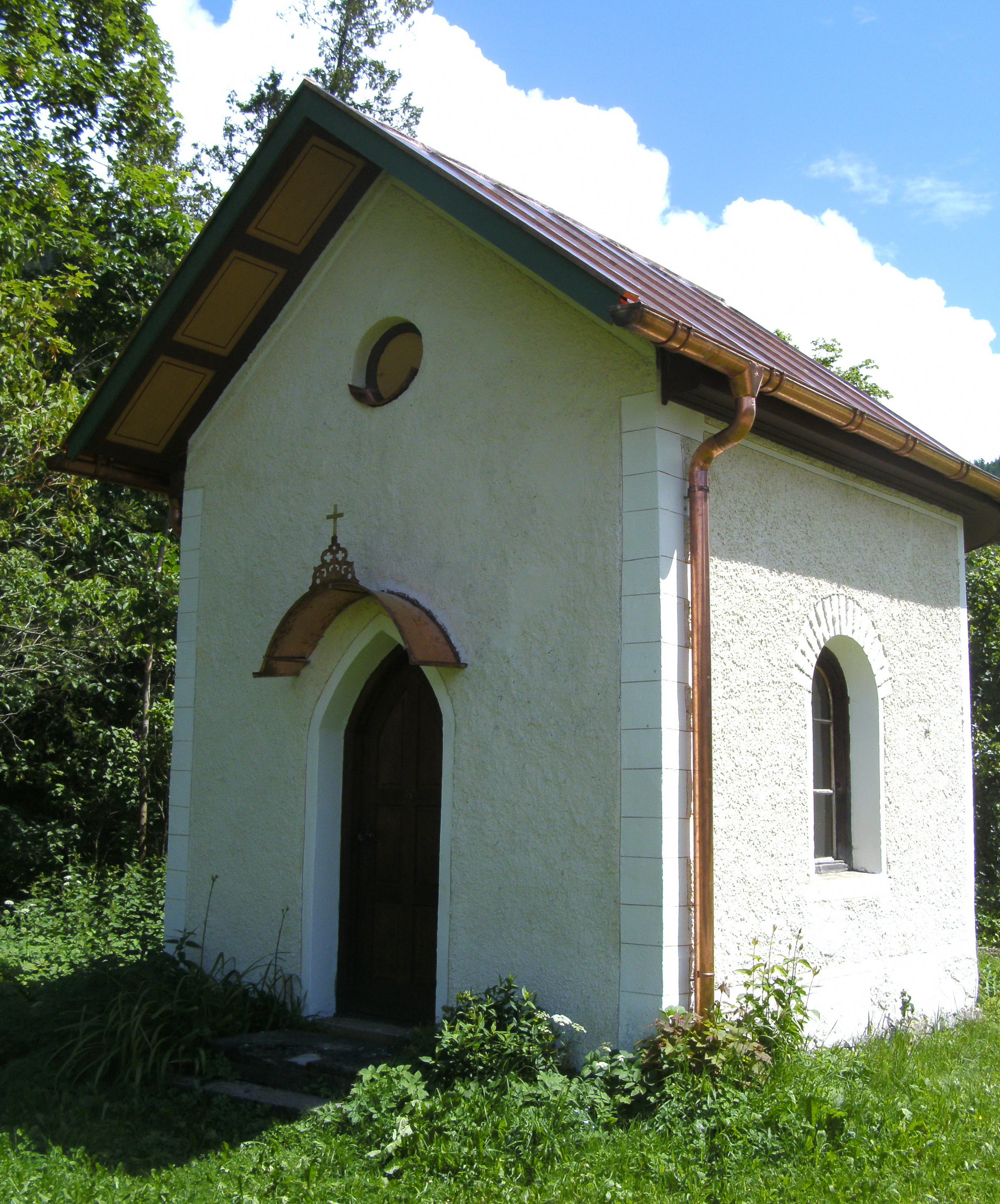 Kapelle im Weiler Sachenbach in Jachenau